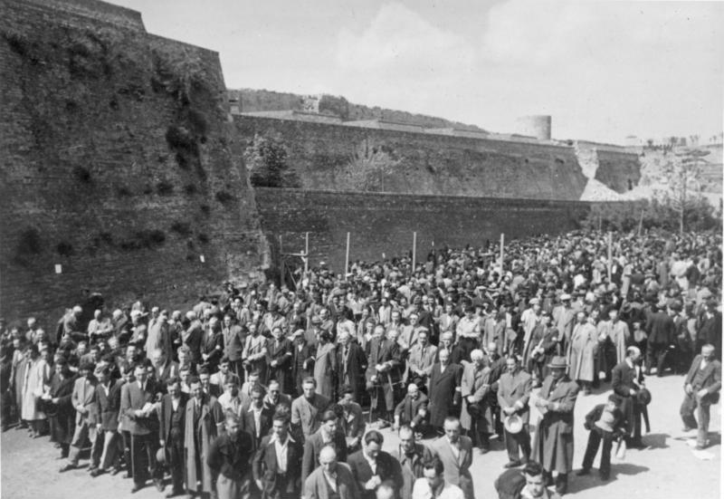 Krieg auf dem Balkan: Belgrad. Die Juden in Belgrad werden für Aufräumungsarbeiten erfasst. PK-Aufnahme: Kriegsberichter: Neubauer April 41 [Bildtitel von Bild 183-L29069]